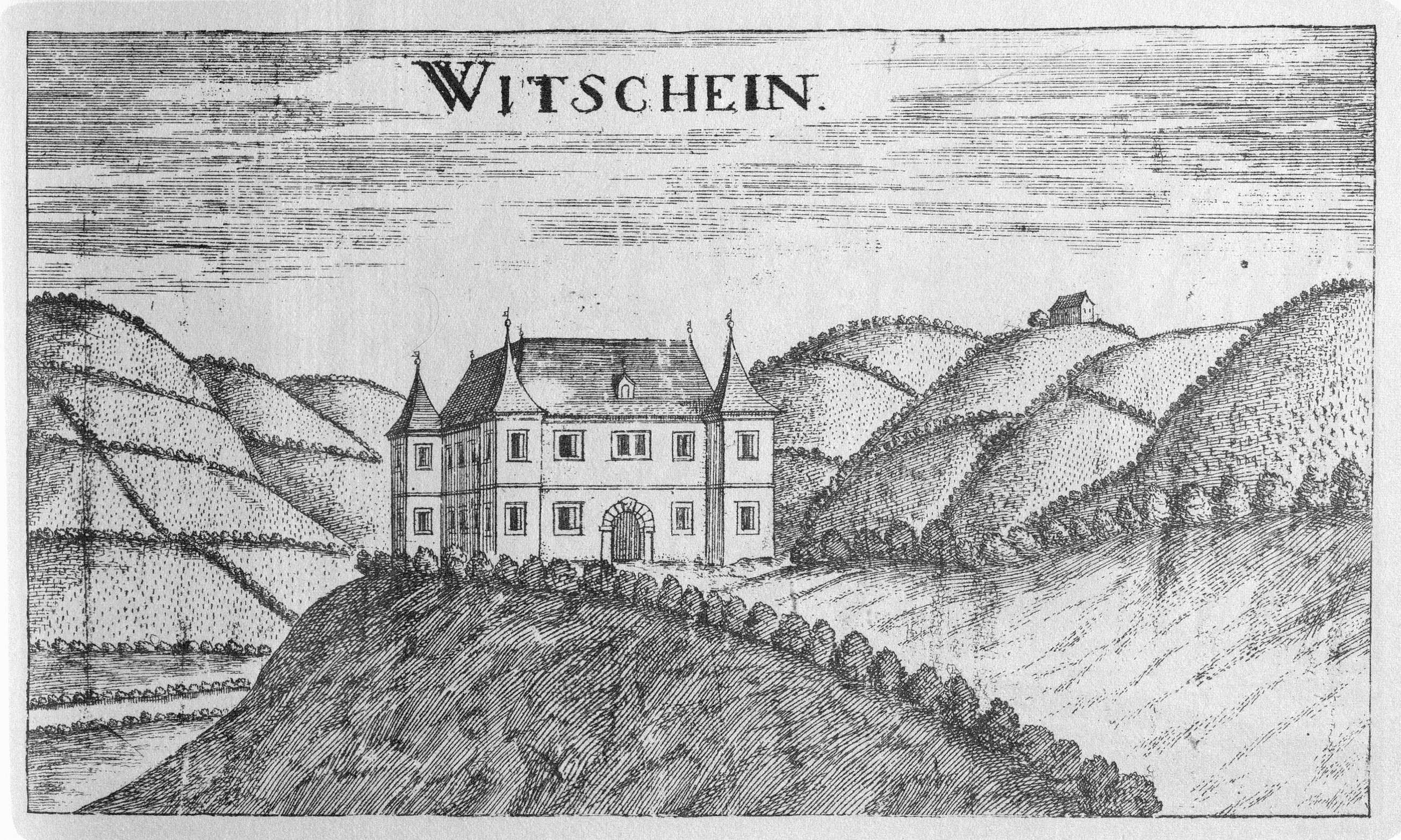 G. M. Vischers Käyserlichen Geographi, Topographia Ducatus Stiriae, Das ist: Eigentliche Delineation / und Abbildung aller Städte / Schlösser / Marcktfleck / Lustgärten / Probsteyen / Stiffter / Clöster und Kirchen / so es sich im Herzogthumb Steyrmarck befinden; Und anjetzo Umb einen billichen Preyß zu finden seynd Bey Johann Bitsch Universitäts Buchhandlern / Auff dem Juden=Platz bey der guldenen Saulen. Graz 1681 Die Nummerierung der Dateien folgt der alphabetischen Reihung der Ortsnamen und entspricht nicht dem Vischer-Register